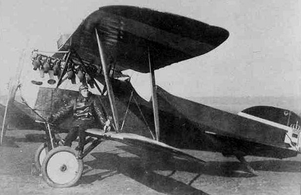 Phönix D.I